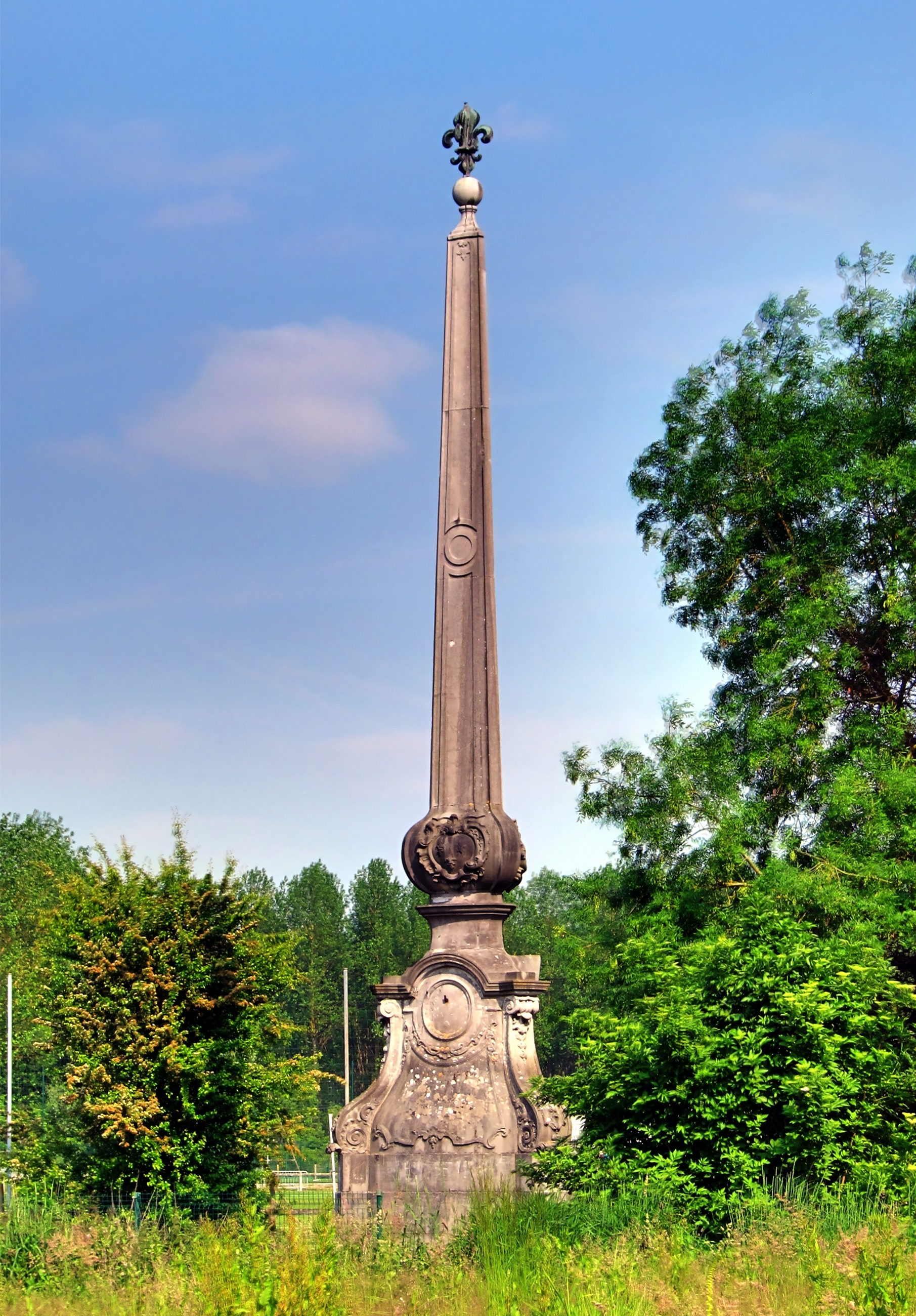 La Pyramide de Fontenoy à Cysoing (Nord).